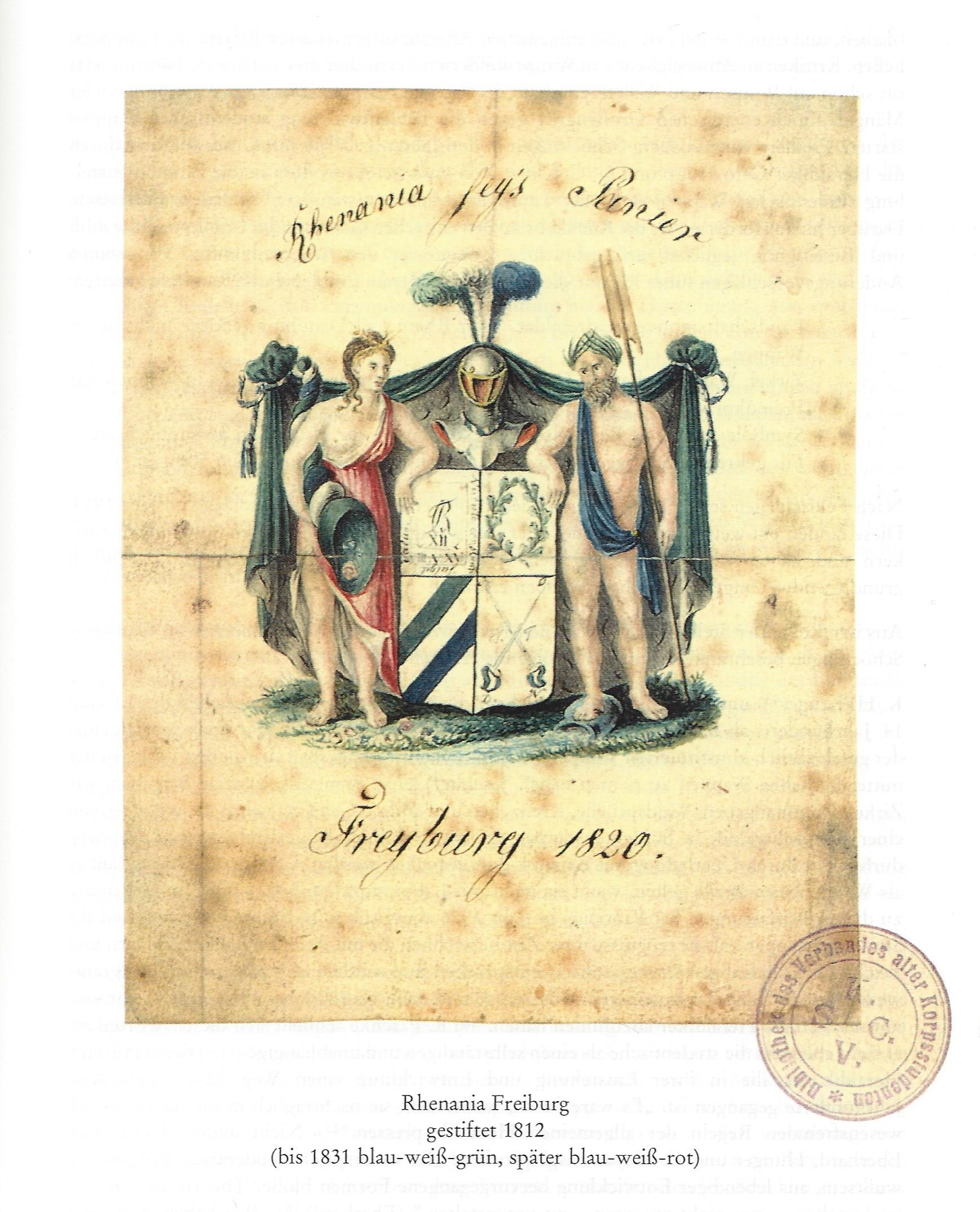 Wappen des Corps Rhenania Freiburg mit den ersten Farben